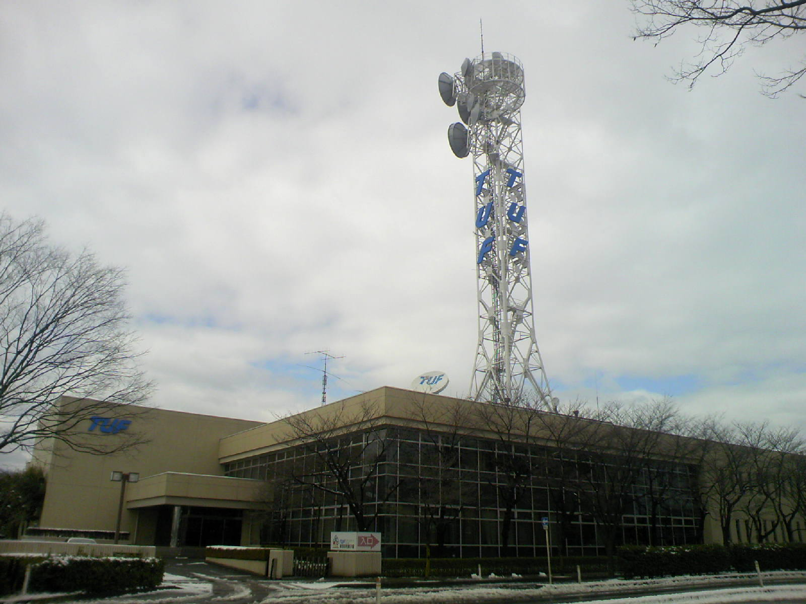 TV-U Fukushima,Inc. テレビユー福島本社